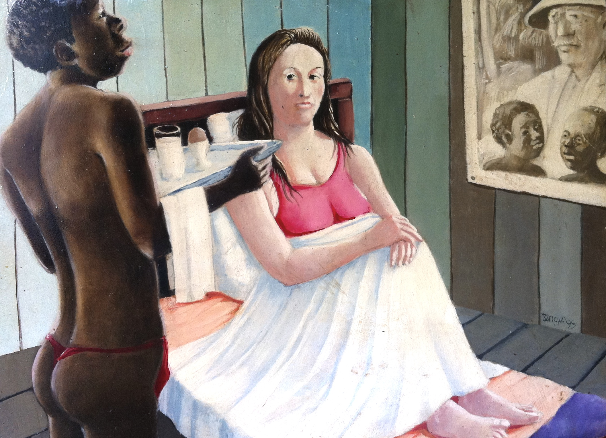 Schilderij van Bob Tenge, 30 x 22 olieverf op koper.